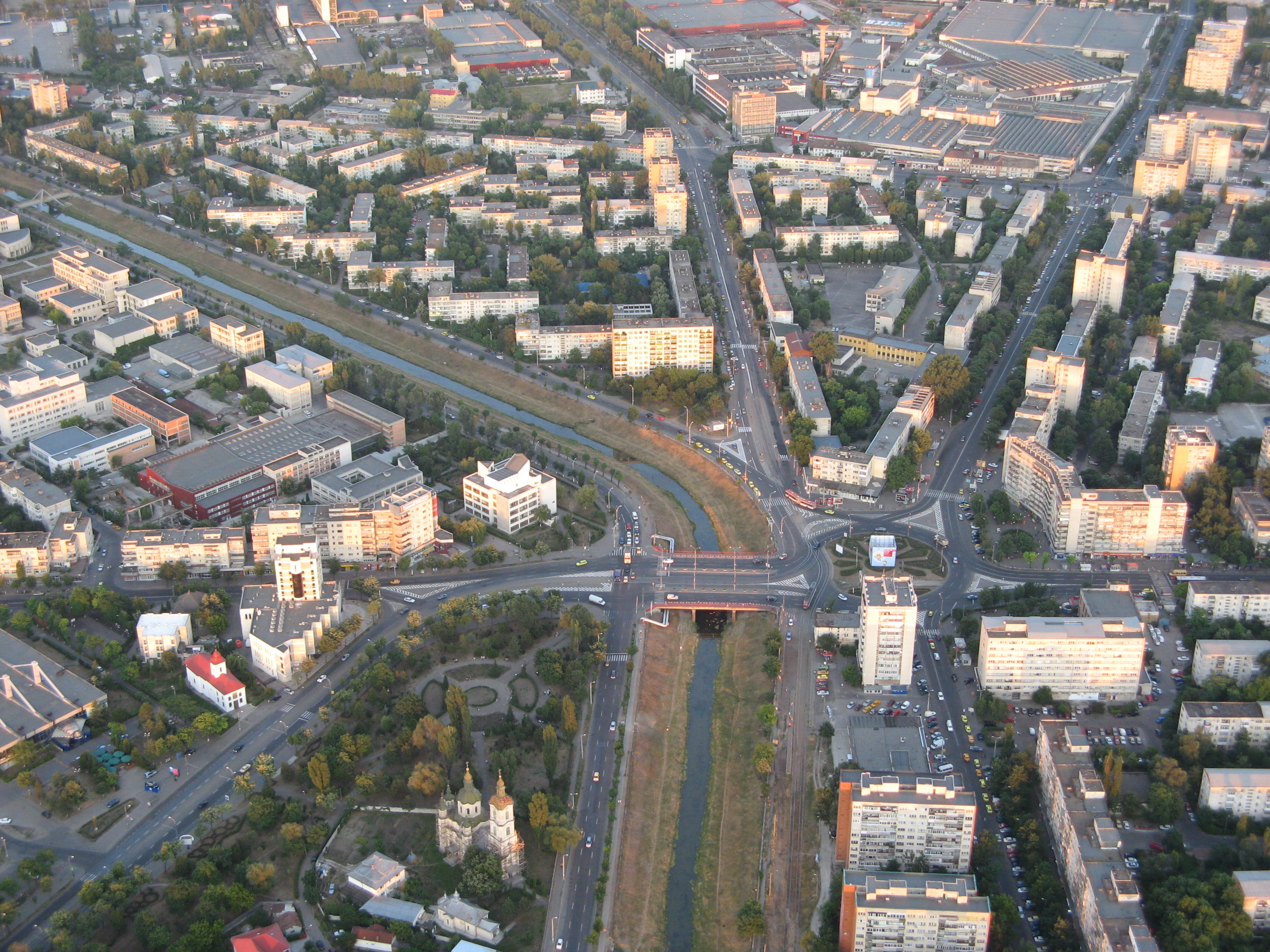 Iasi, aerial view Podu Roș (Red Bridge) , Iaşi,Romania